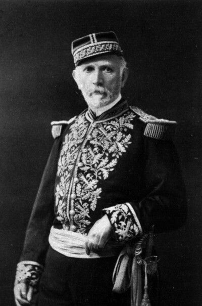 Cornelio Saavedra Rodríguez (*Santiago; 1821 - 7 de abril de 1891) Militar y político chileno, sus padres fueron Manuel Saavedra Cabrera , hijo del prócer argentino Cornelio Saavedra, y doña Josefina Rodríguez Salcedo. Casado con Dorotea Rivera Serrano [h.l del General y prócer de la Independencia de Chile don Juan de Dios Rivera y Freire de Andrade y de doña María del Rosario Serrano Galeazo de Alfaro.]